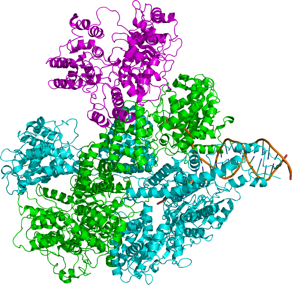 PDB 1W36